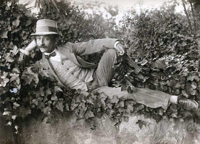 Raffaele de Vico